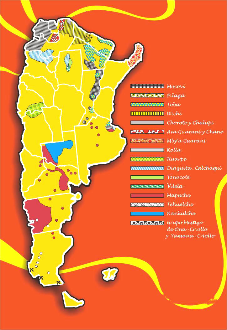 Distribución de pueblos aborigenes en Argentina.